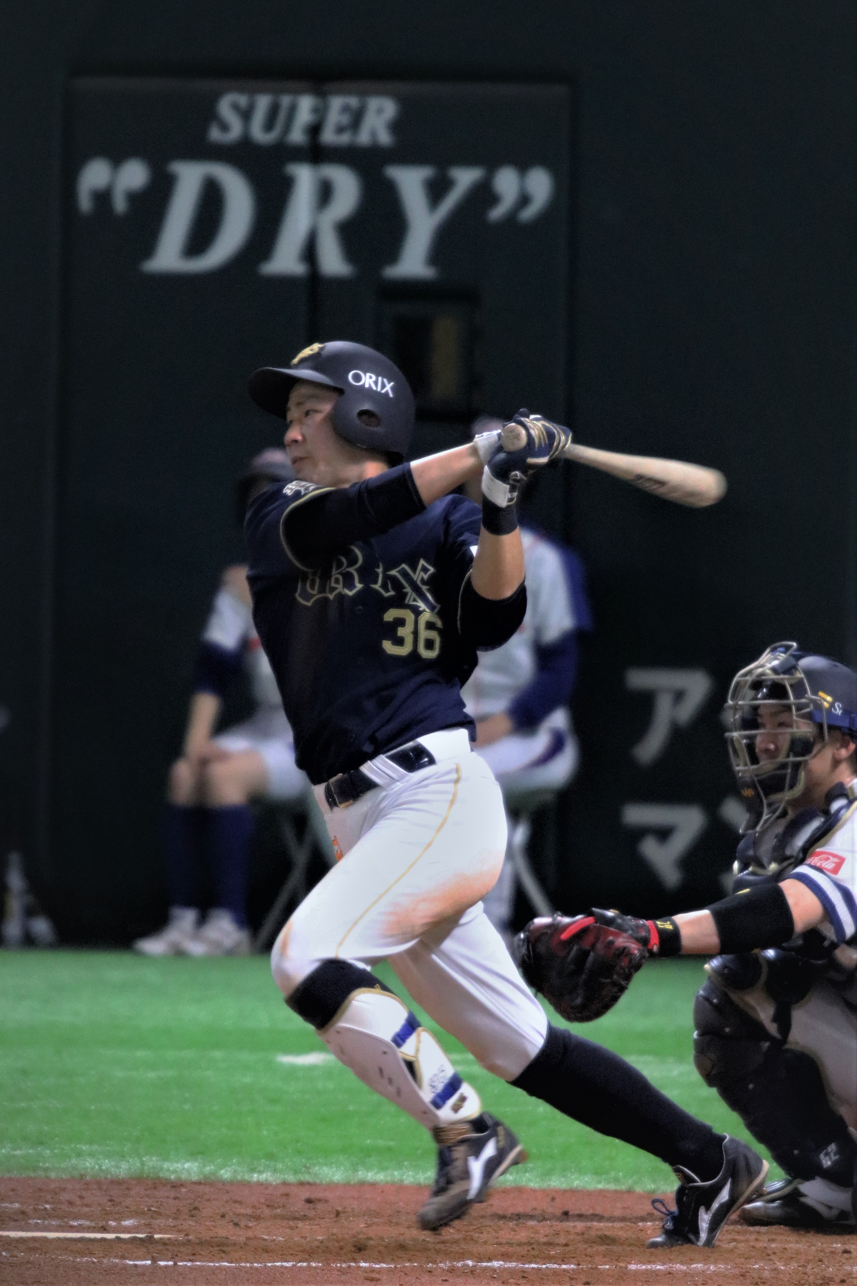 2018年3月31日 福岡ヤフオクドーム